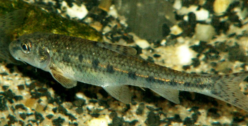 Gobio gobioRiviergrondel